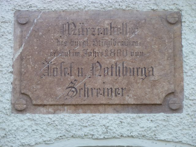 Stieglkeller-Festungsgasse-2